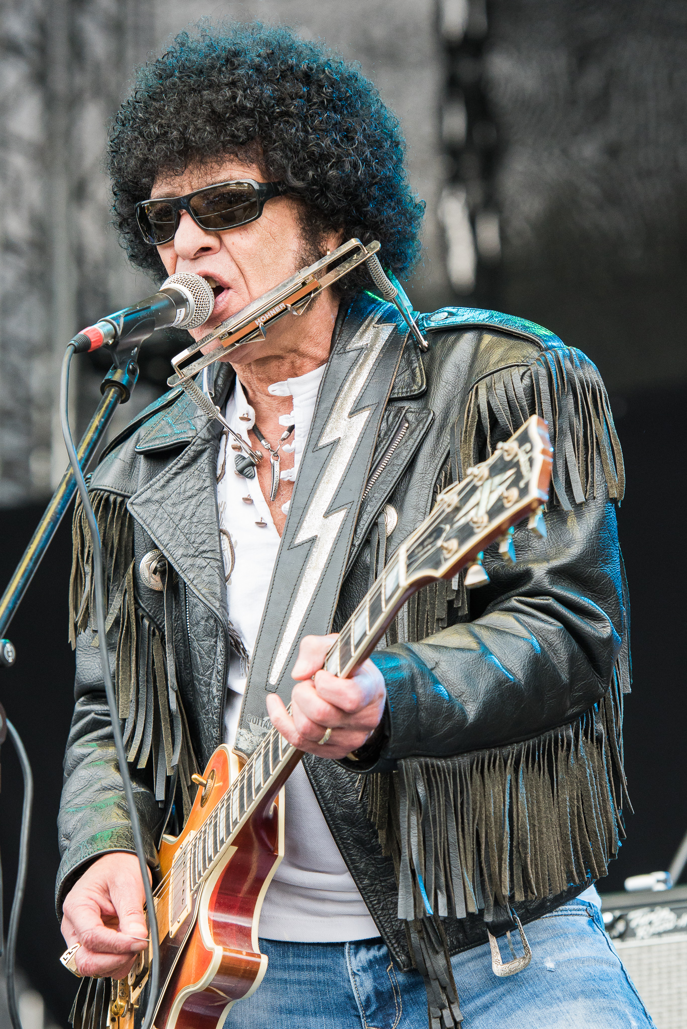 Brombachsee,Concertbüro Franken,Festival,Konzert,Lieder am See,Livekonzert,Livemusik,Mungo Jerry,Musik,Ray Dorset